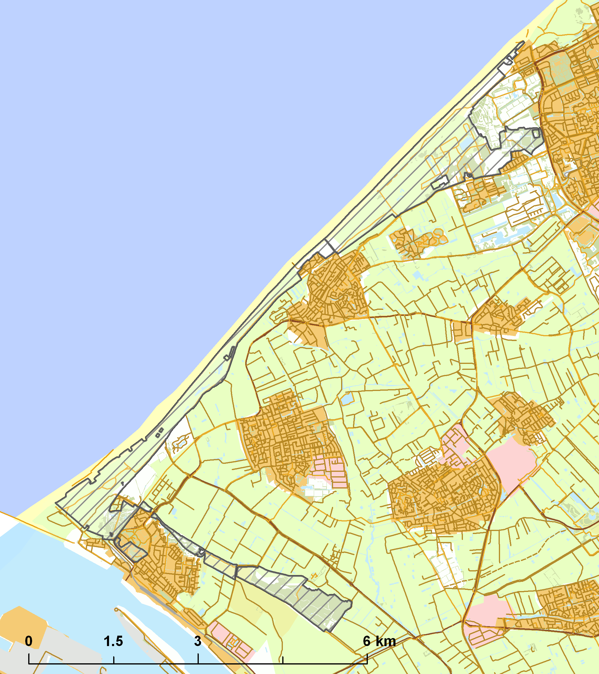 Natura2000 - Solleveld & Kapittelduinen.png